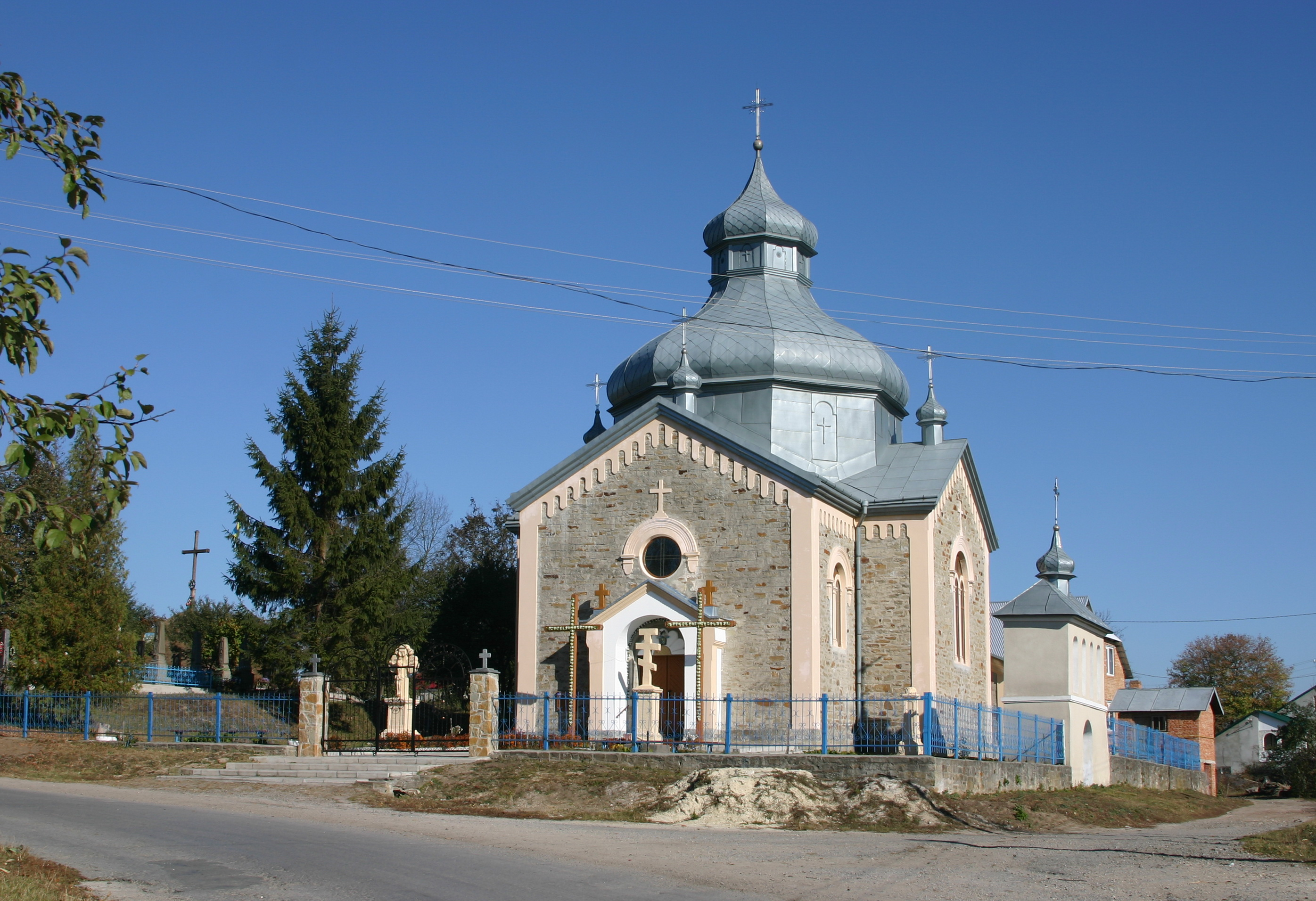 Crkv_Stupky_1.jpg: Церква Різдва Пресвятої Богородиці с. Ступки